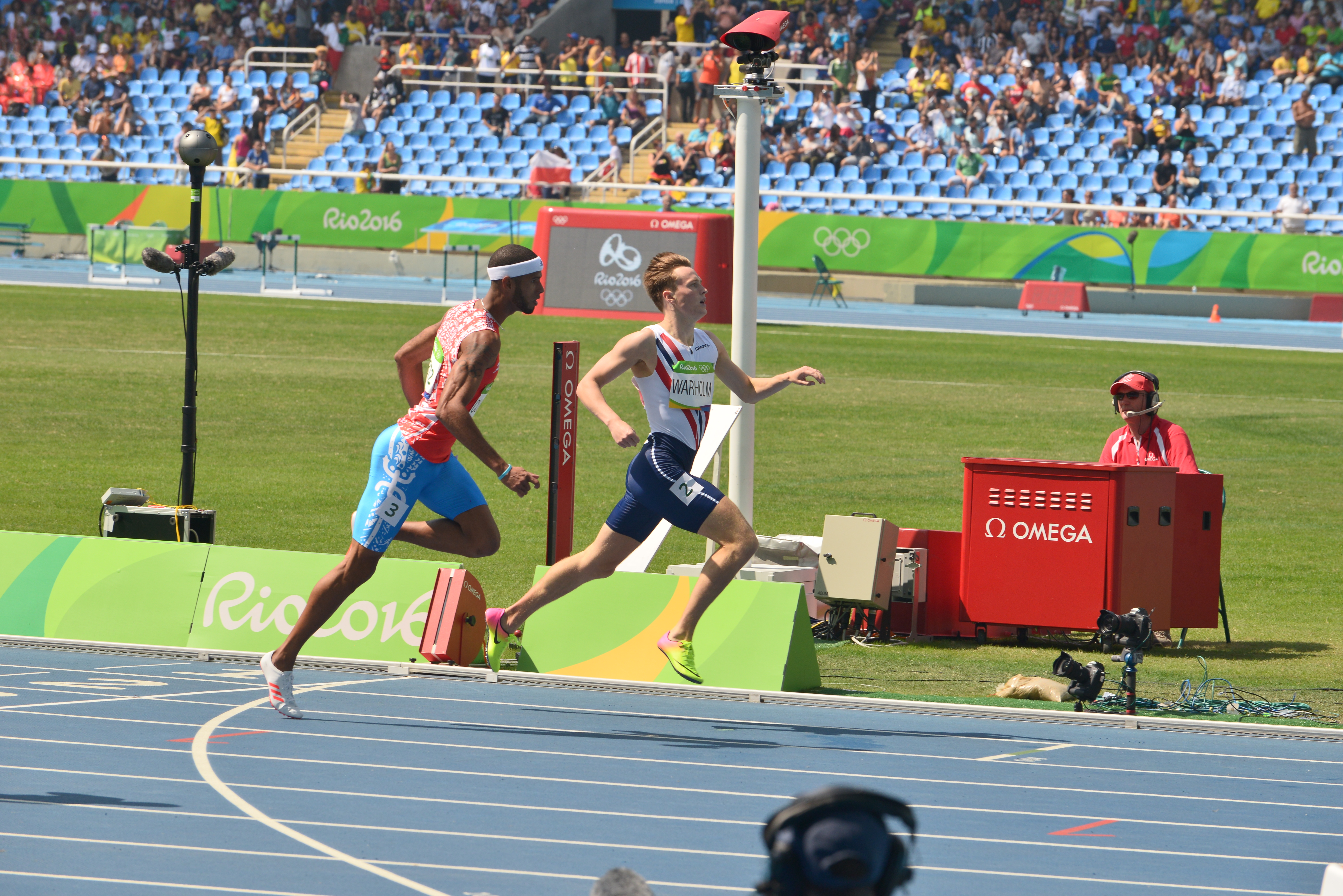 Quelques séries du 400m haies des jo de Rio 2016